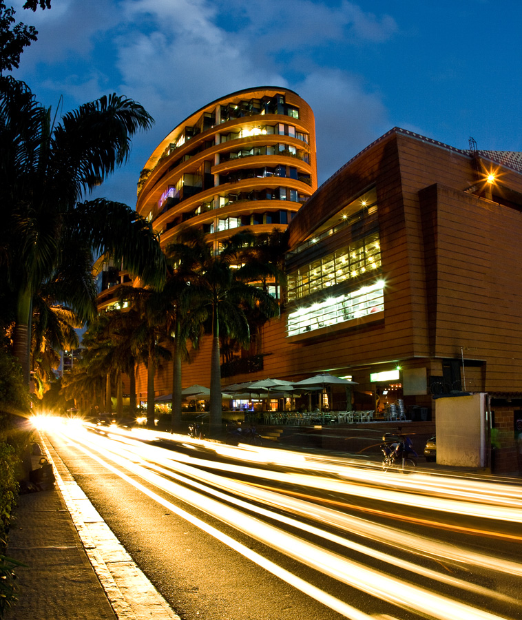 Fachada de Centro San Ignacio